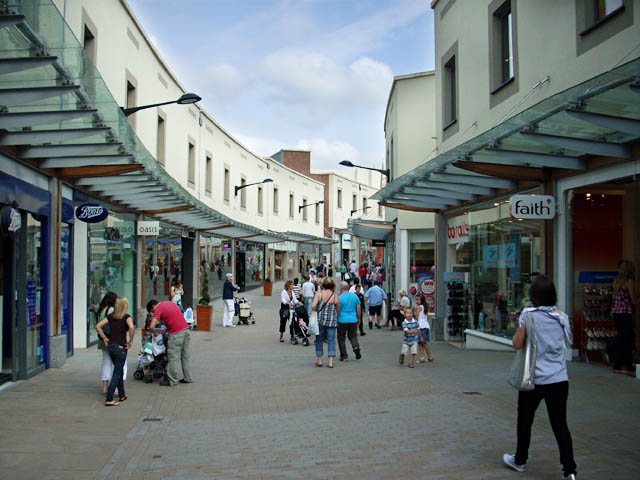 Fremlin Walk